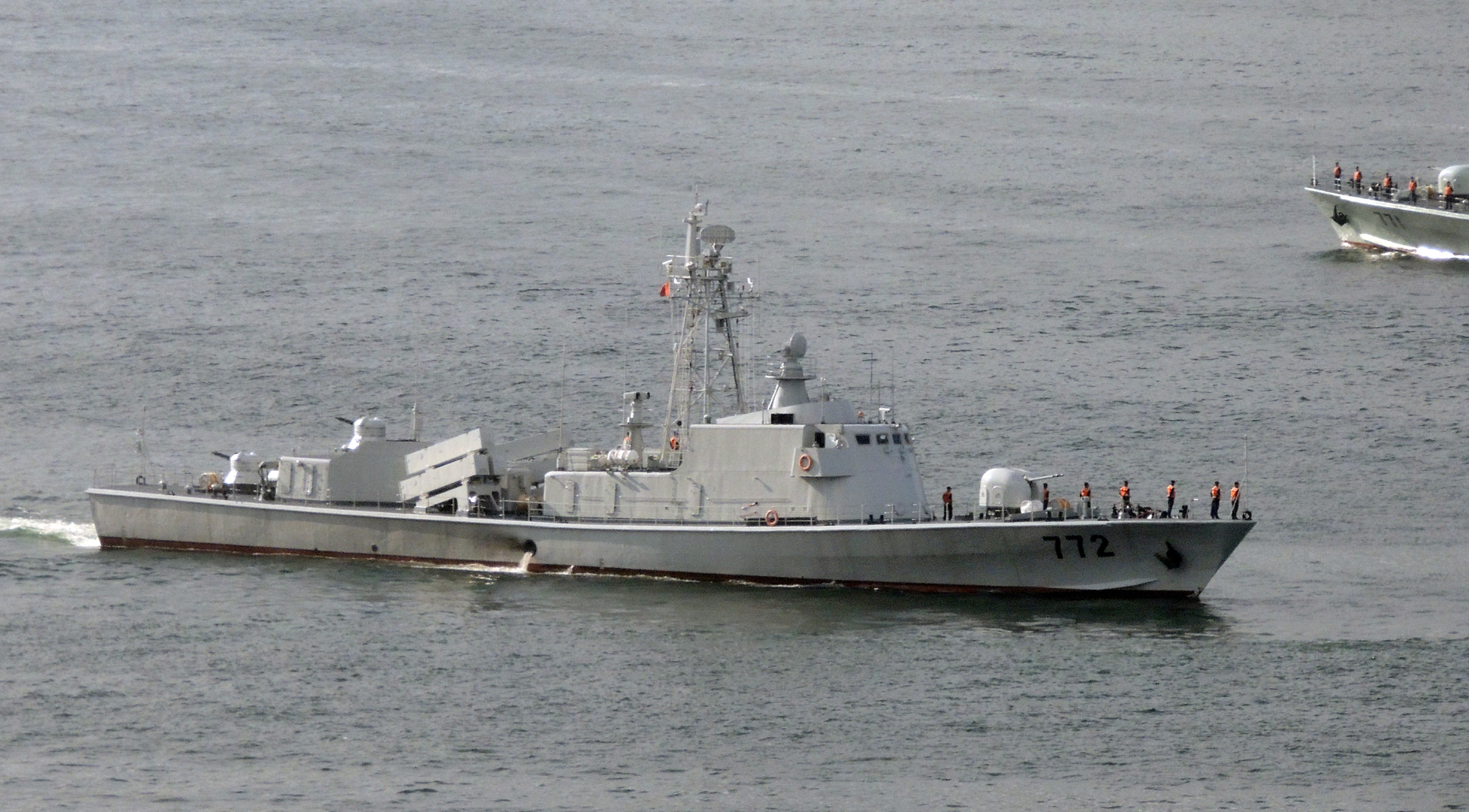 駐港部隊艦艇大隊037II型-772導彈艦